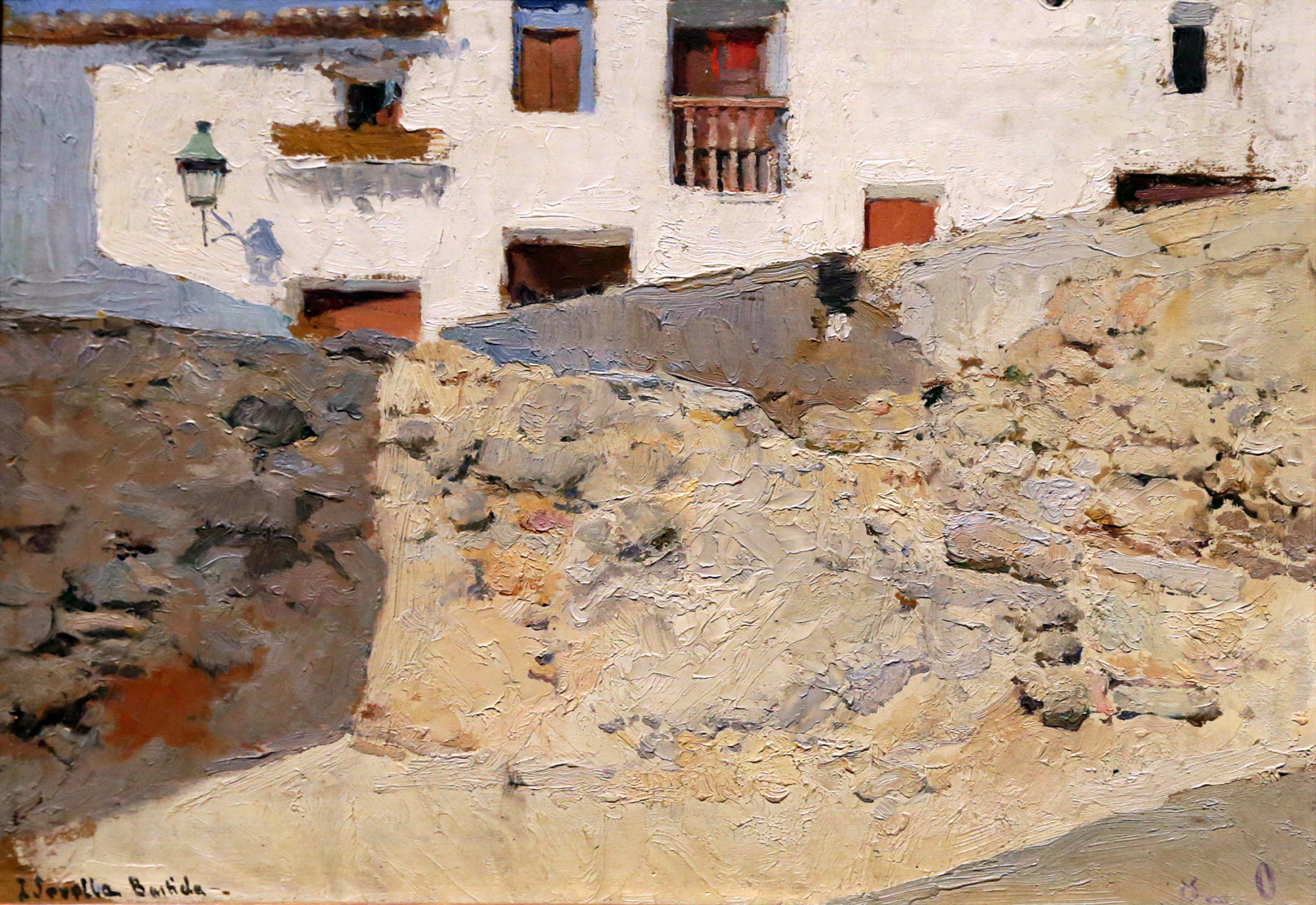 Calle de Buñol del pintor Joaquín Sorolla, 1890-95. Oleo sobre tabla. Museo Sorolla de Madrid.